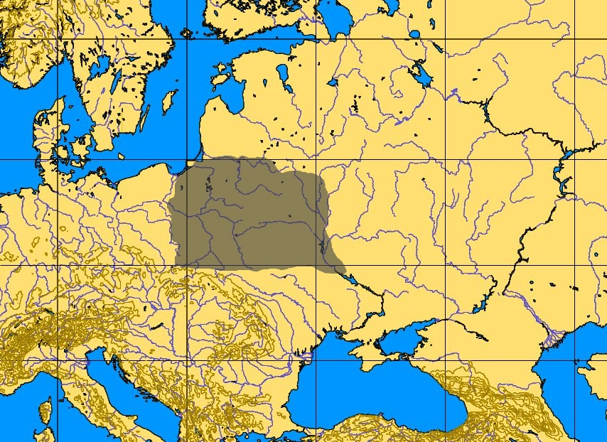 Zasięg szerokopojętej kultury janisławickiej